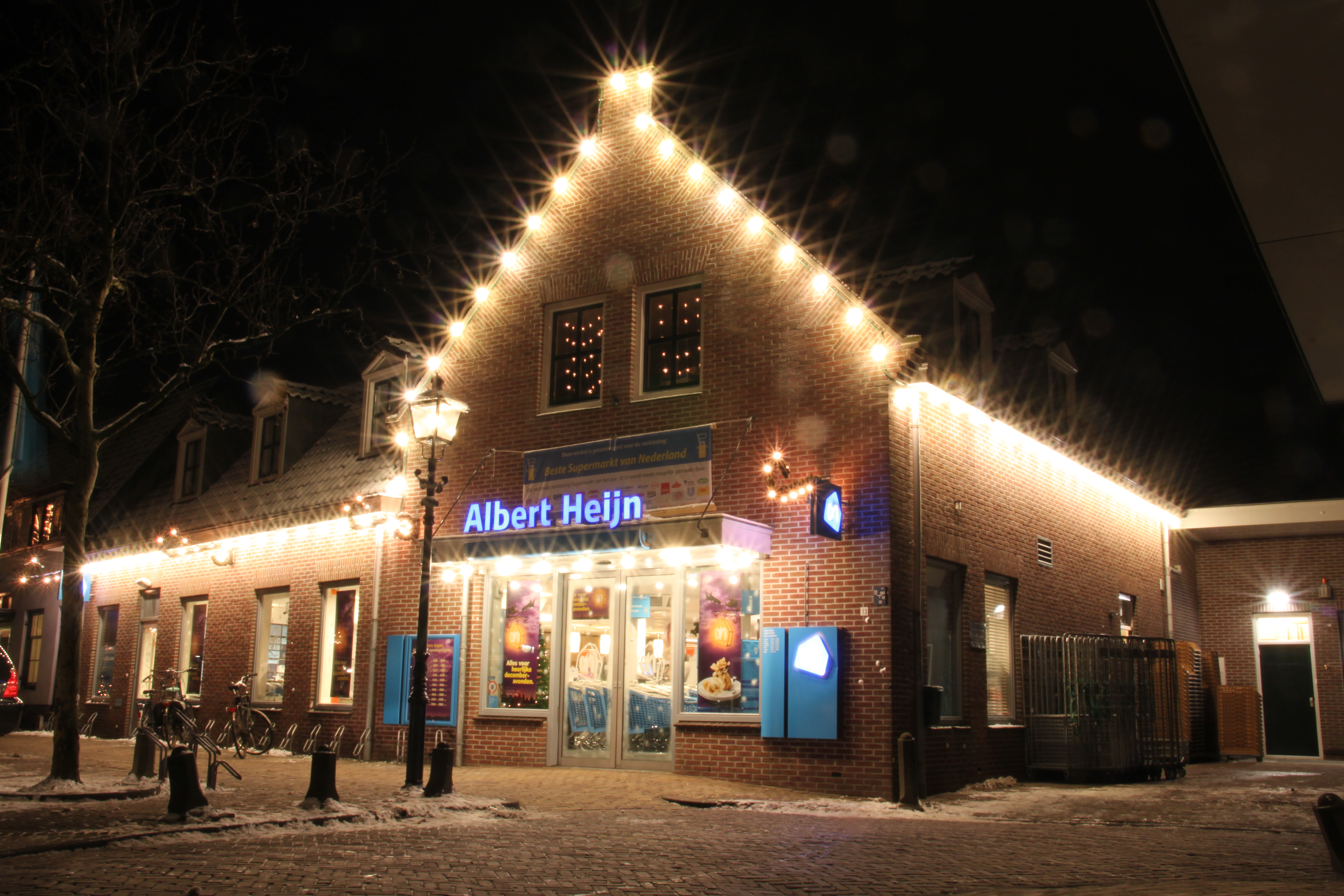 Albert Heijn te Houten, Oude Dorp